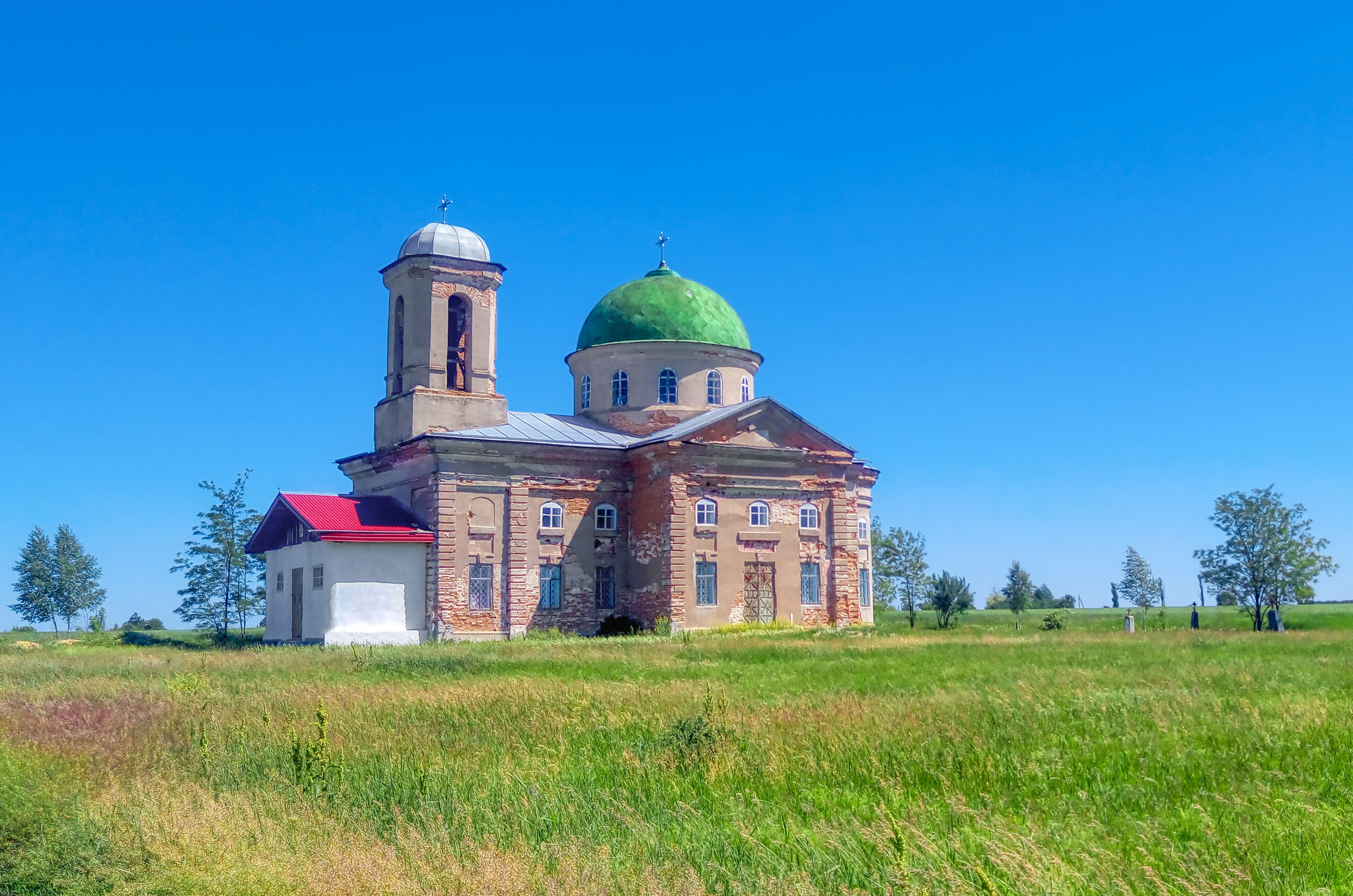 Свято-Іоанна Богословська церква, Лутківка, вул. Щорса, 3